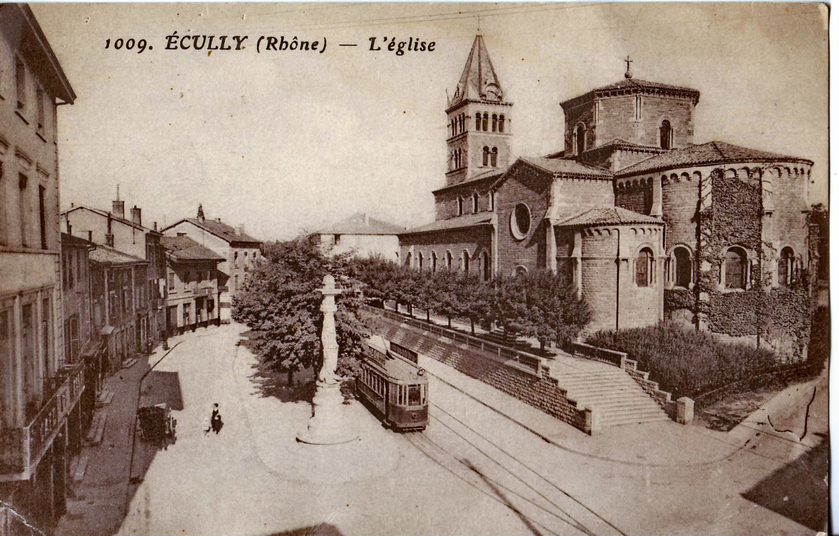 Carte postale ancienne éditée par Goutagny, n°1009 : ÉCULLY - L'Église Vue du terminus d'Écully de la ligne de tramway Pont-Mouton - Écully exploitée par la Pont-Mouton - Écully, puis par l'OTL (ligne 19)